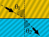 Illustraion af refraktion i en grænseflade. Created with POV-Ray.